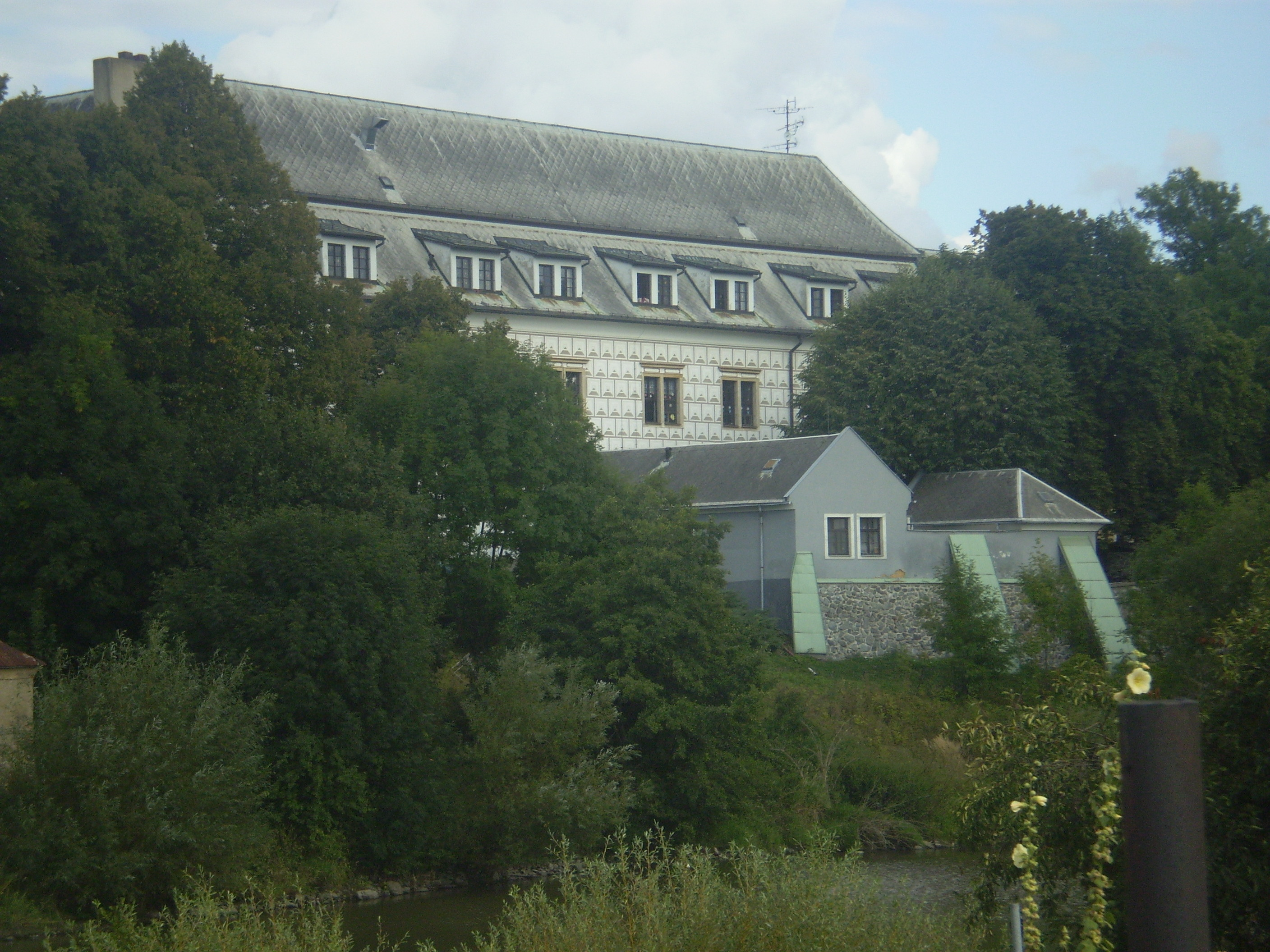 zámek Bystré